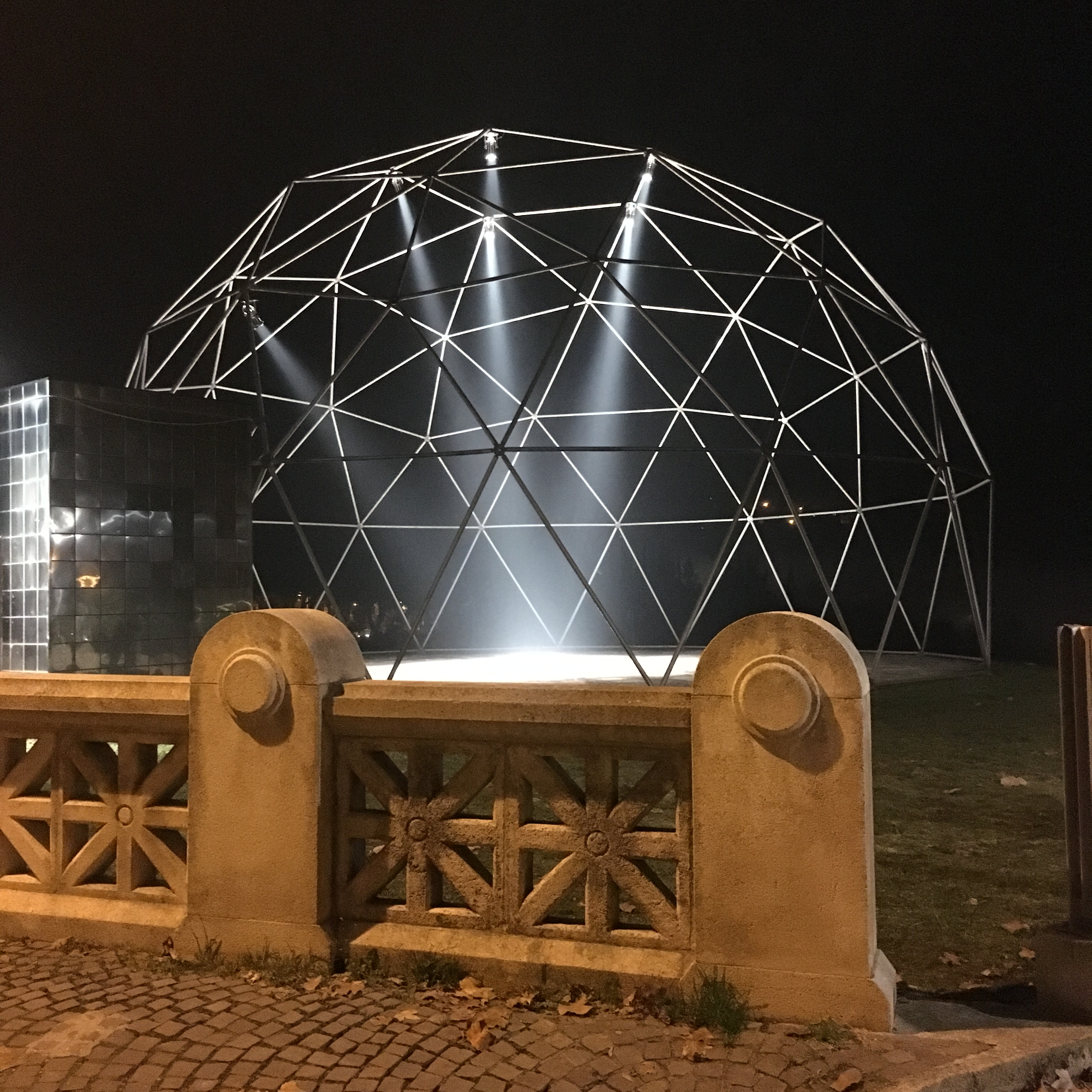 Spoletosfera